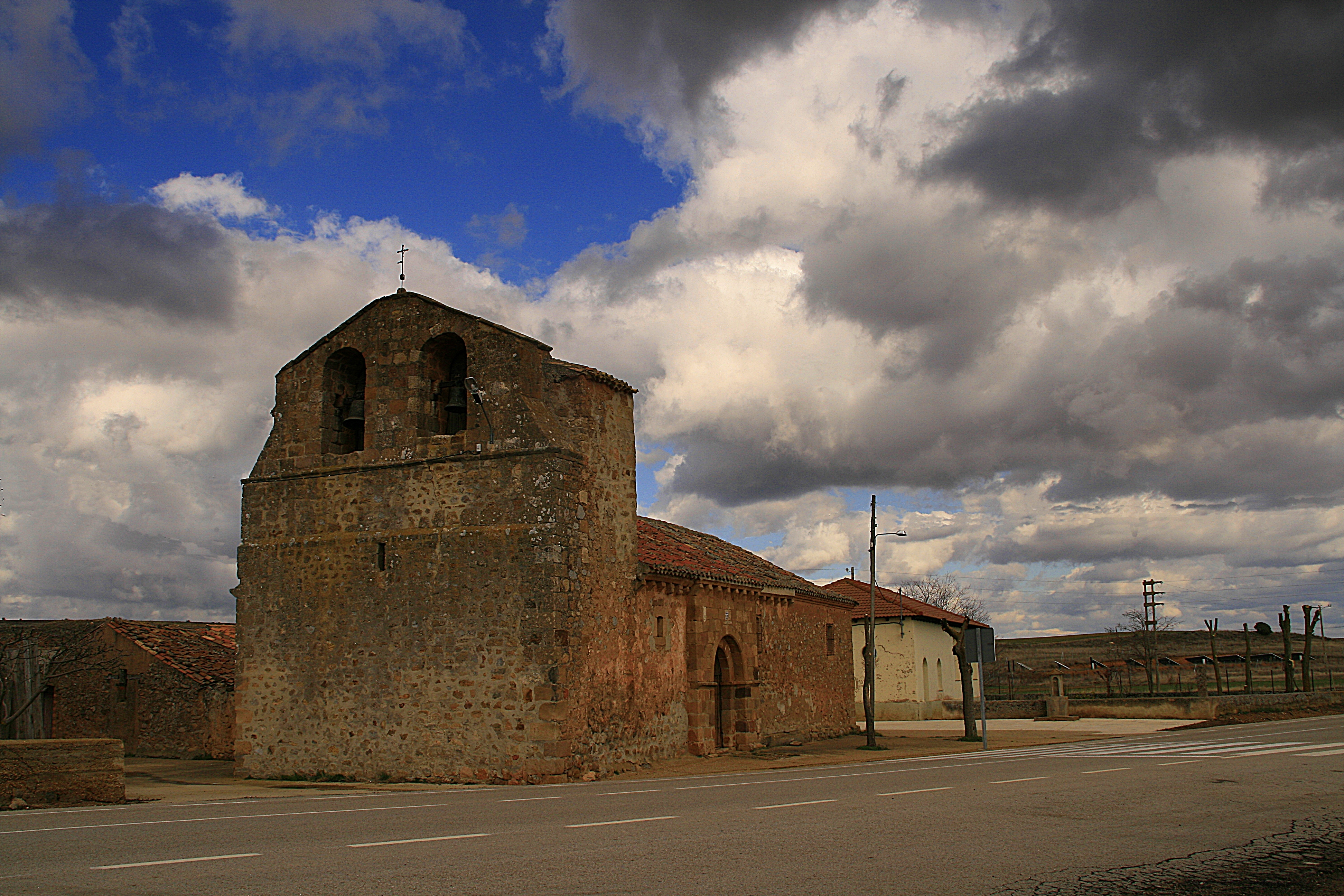 Ojuel: Iglesia de San Pedro Apóstol